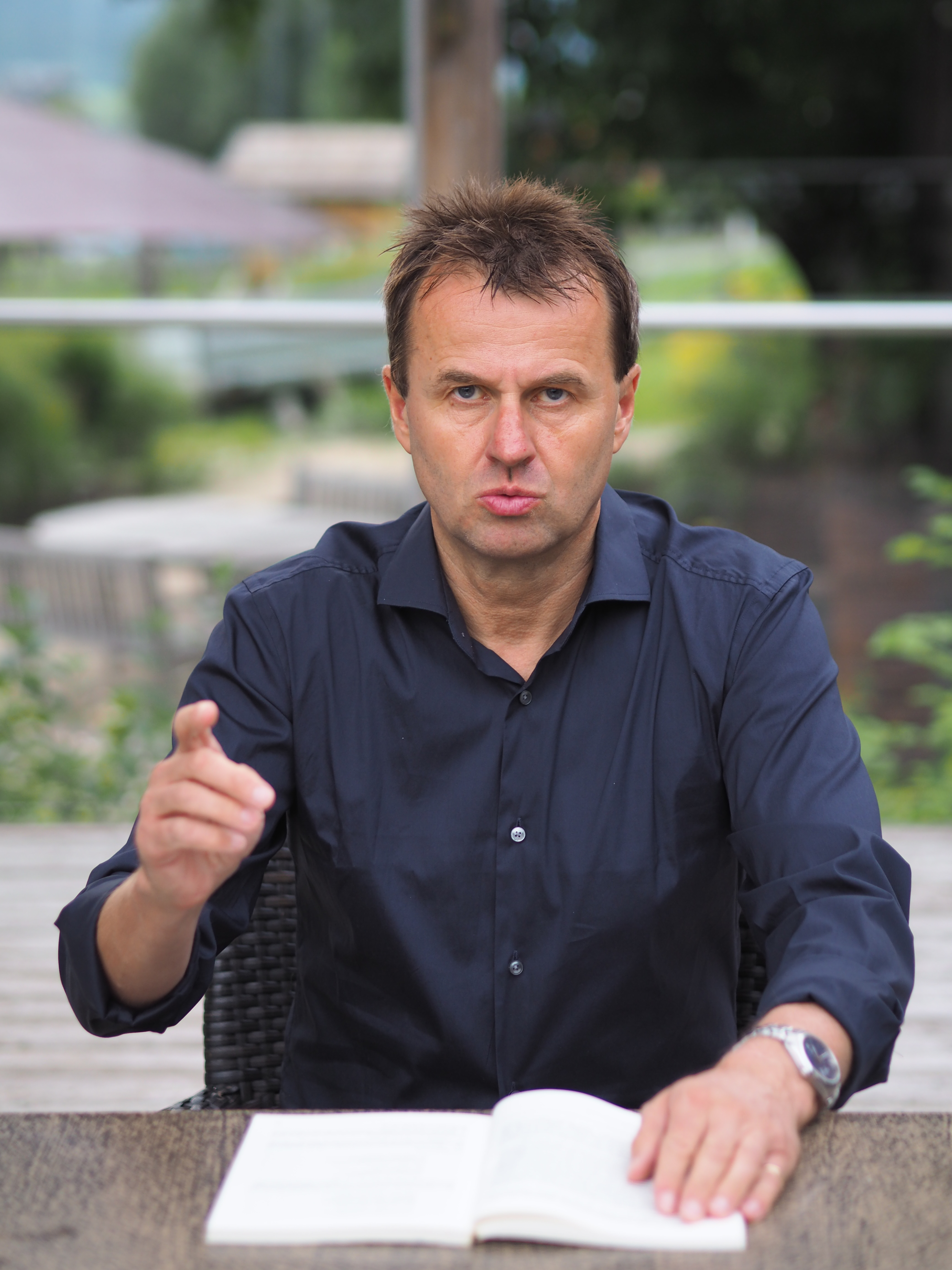 Copyright: Blue Ledam